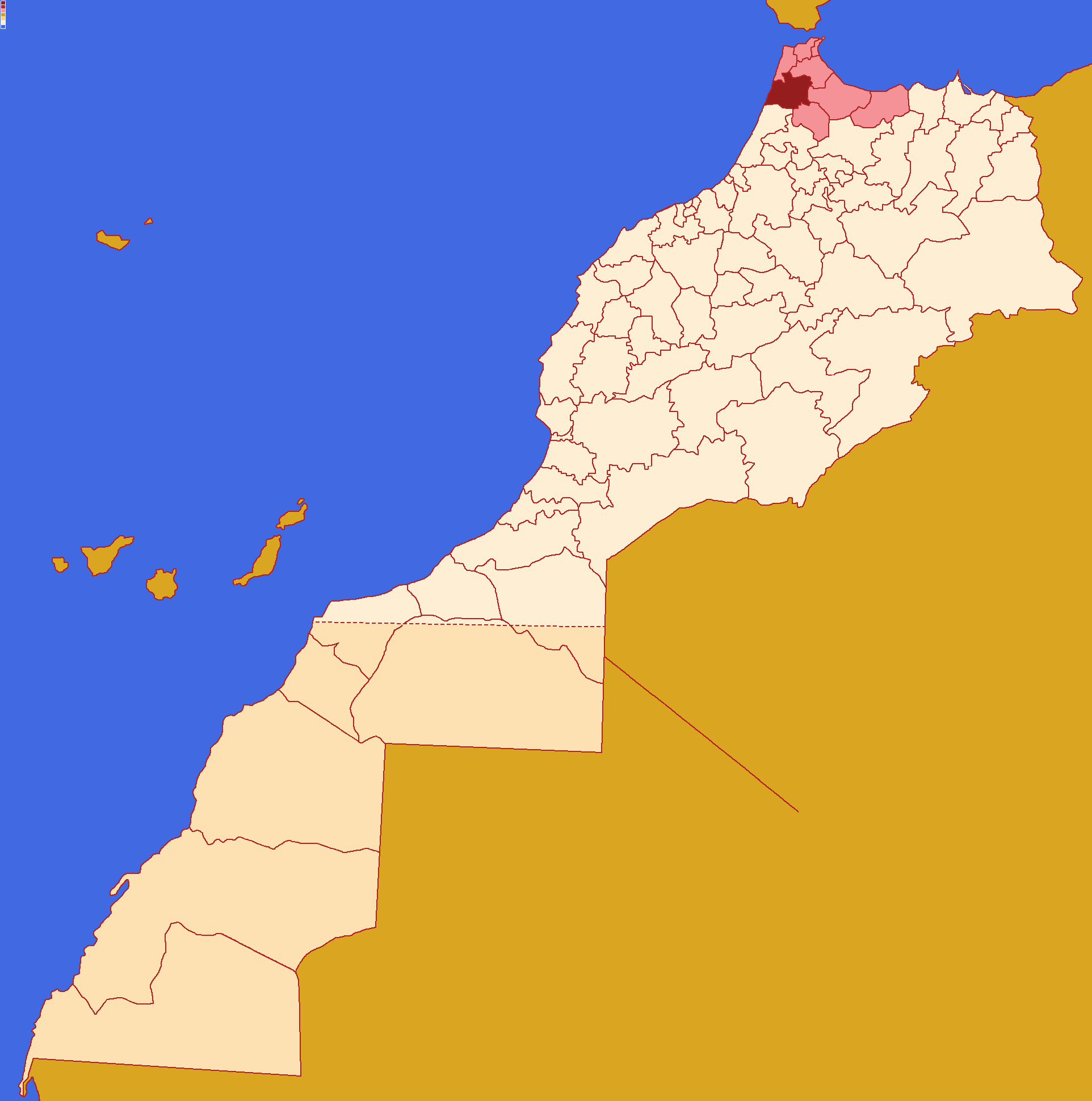 Localização da província de Larache dentro da região de Tânger-Tetuão-Al Hoceïma e dentro de Marrocos. Conforme a reforma administrativa de 2015.